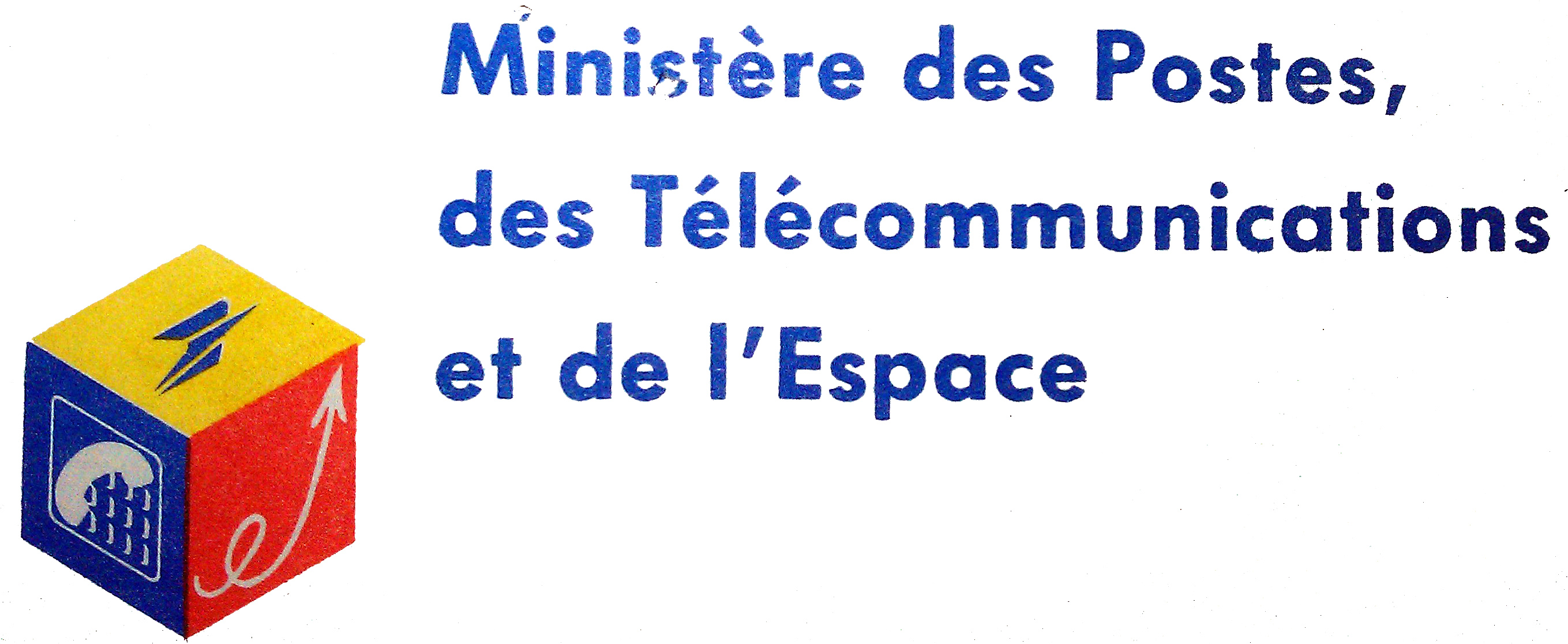 Logo du Ministère des postes, des telecommunications et de l'espace en France en usage de 1988 à 1991